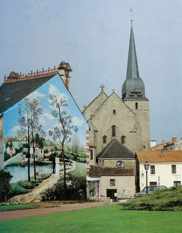 Photo de la peinture murale peinte sur une surface de 144m², située dans la commune française du Poiré-sur-Vie, représentant une œuvre du peintre français Raphaël Toussaint, Les mariés du Poiré-sur-Vie.